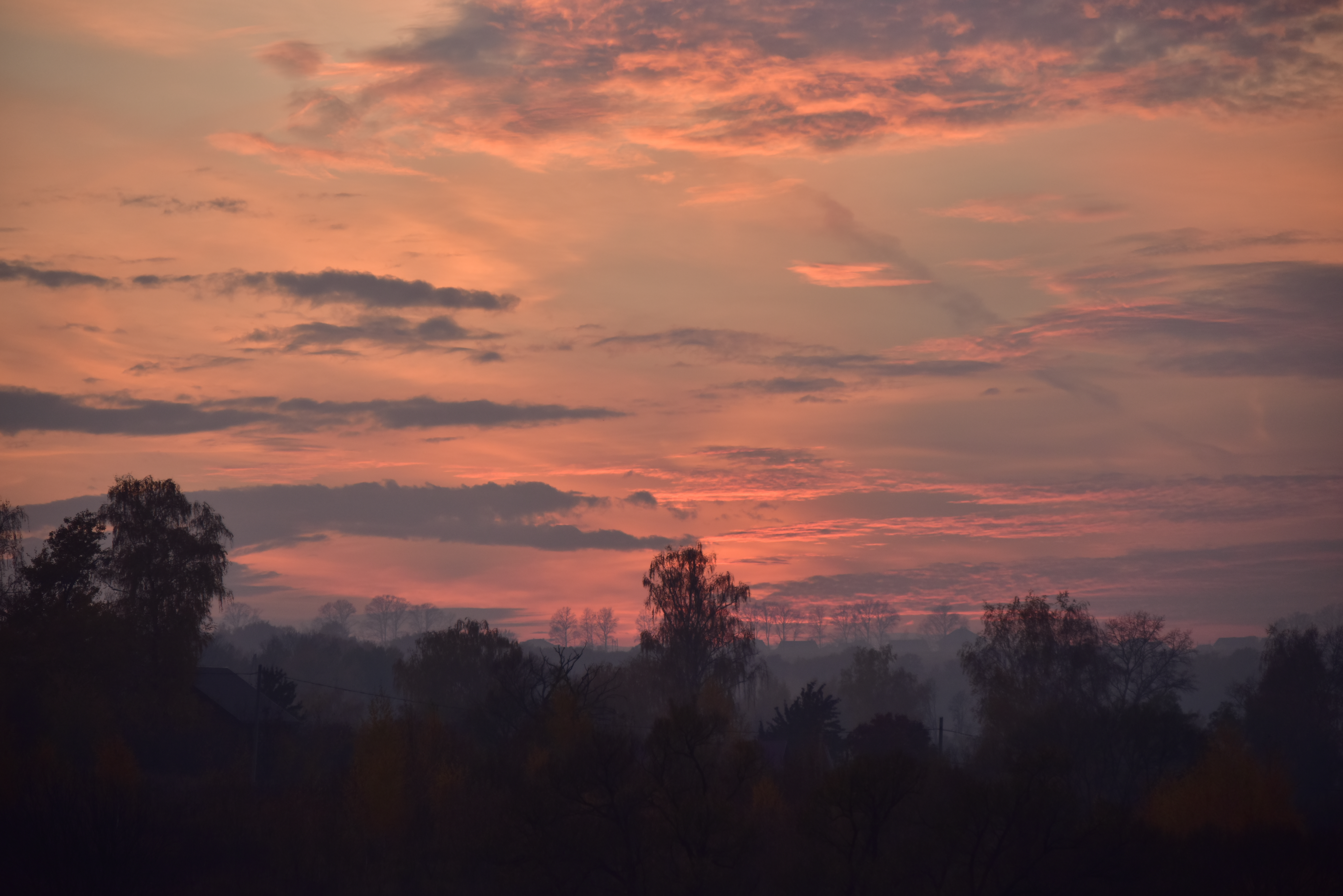 Вид от Мещериново на деревню Селино на закате летом.